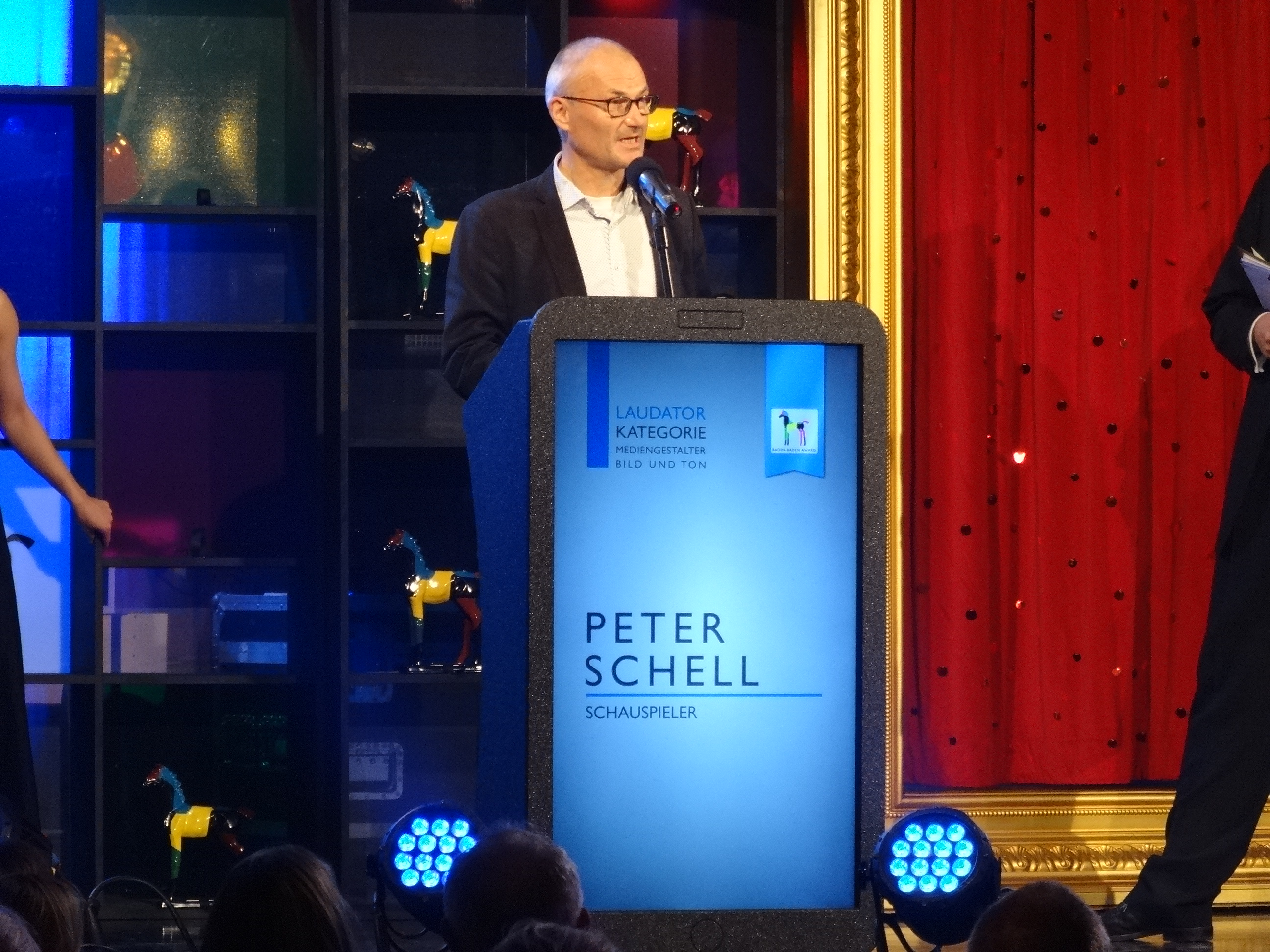 Impression vom Baden-Baden-Award 2014 unter dem Motto „Generalprobe“. Ausgezeichnet wurden 13 Fachkräfte in fünf Ausbildungsberufen. Die Moderation übernahm der SWR3-Comedy-Chef Andreas Müller.